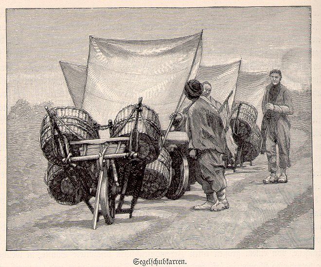 Segelschubkarren (Original text: Chinesischer Segelde:schubkarren) (Buchautor starb 1918)